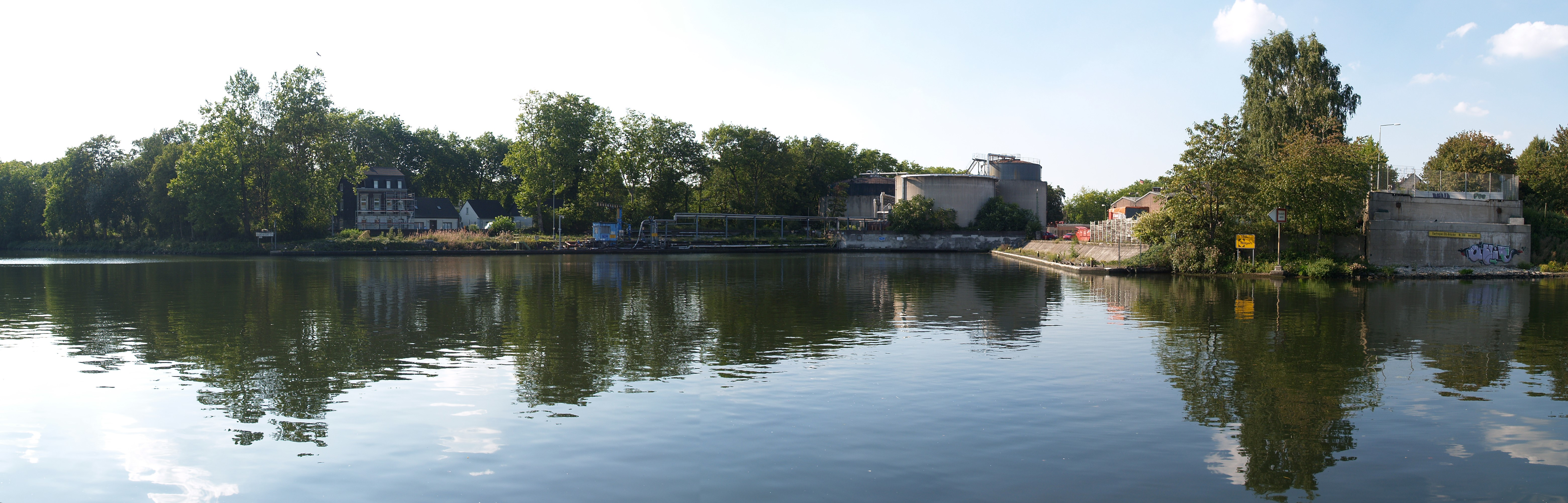 Rhein-Herne-Kanal in Duisburg, Werkshafen der Firma Rütgers